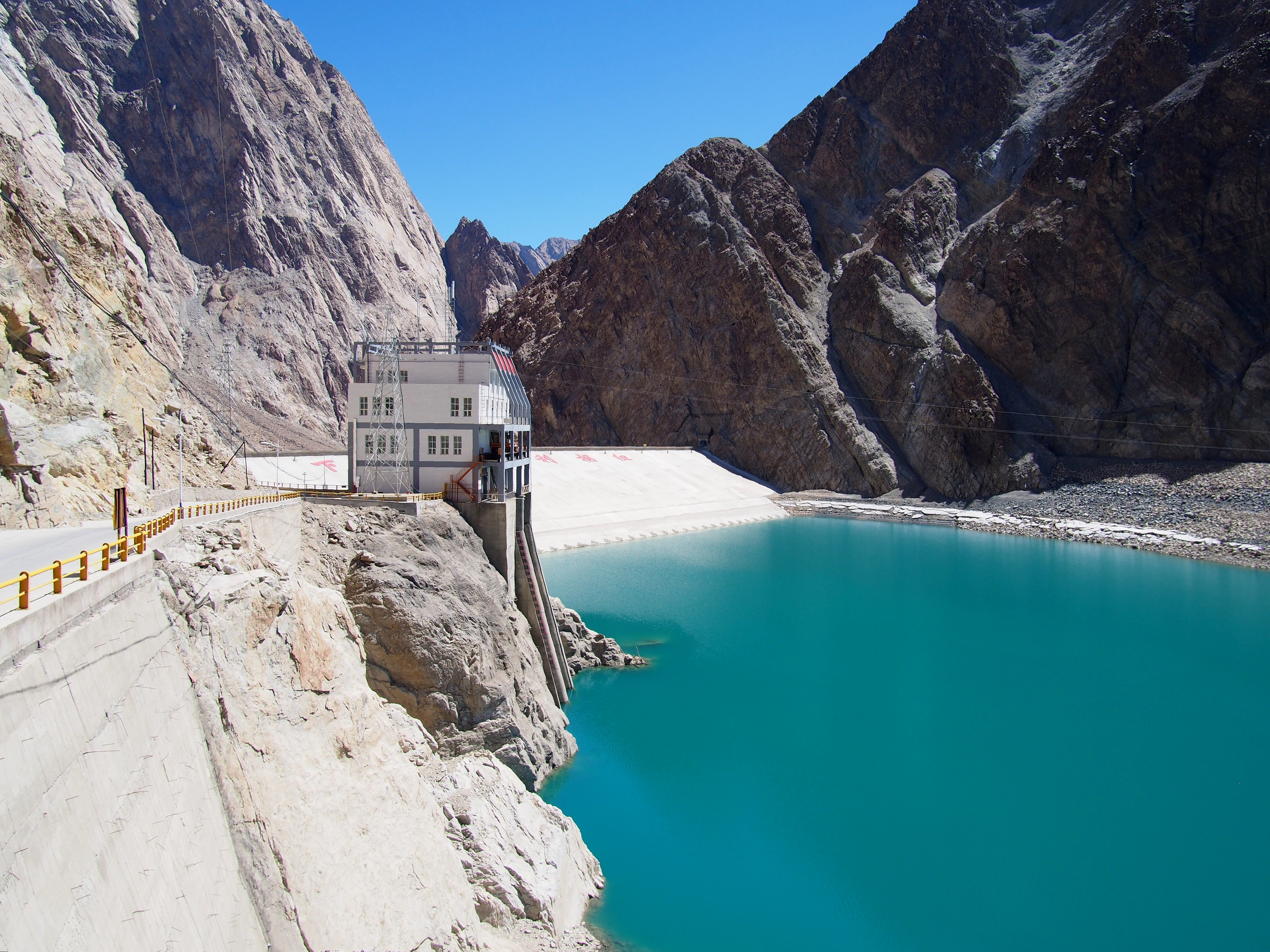 下坂地水利枢纽 - Xiabandi Dam - 2015.04